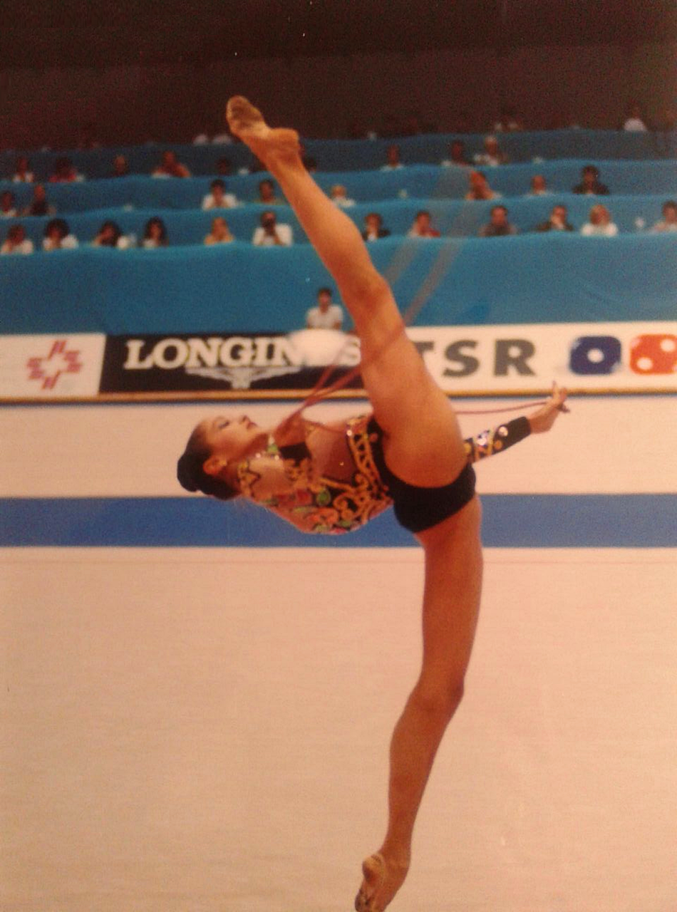 La gimnasta rusa Irina Cháshchina en el Campeonato de Europa de Gimnasia Rítmica de 2001 en Ginebra.